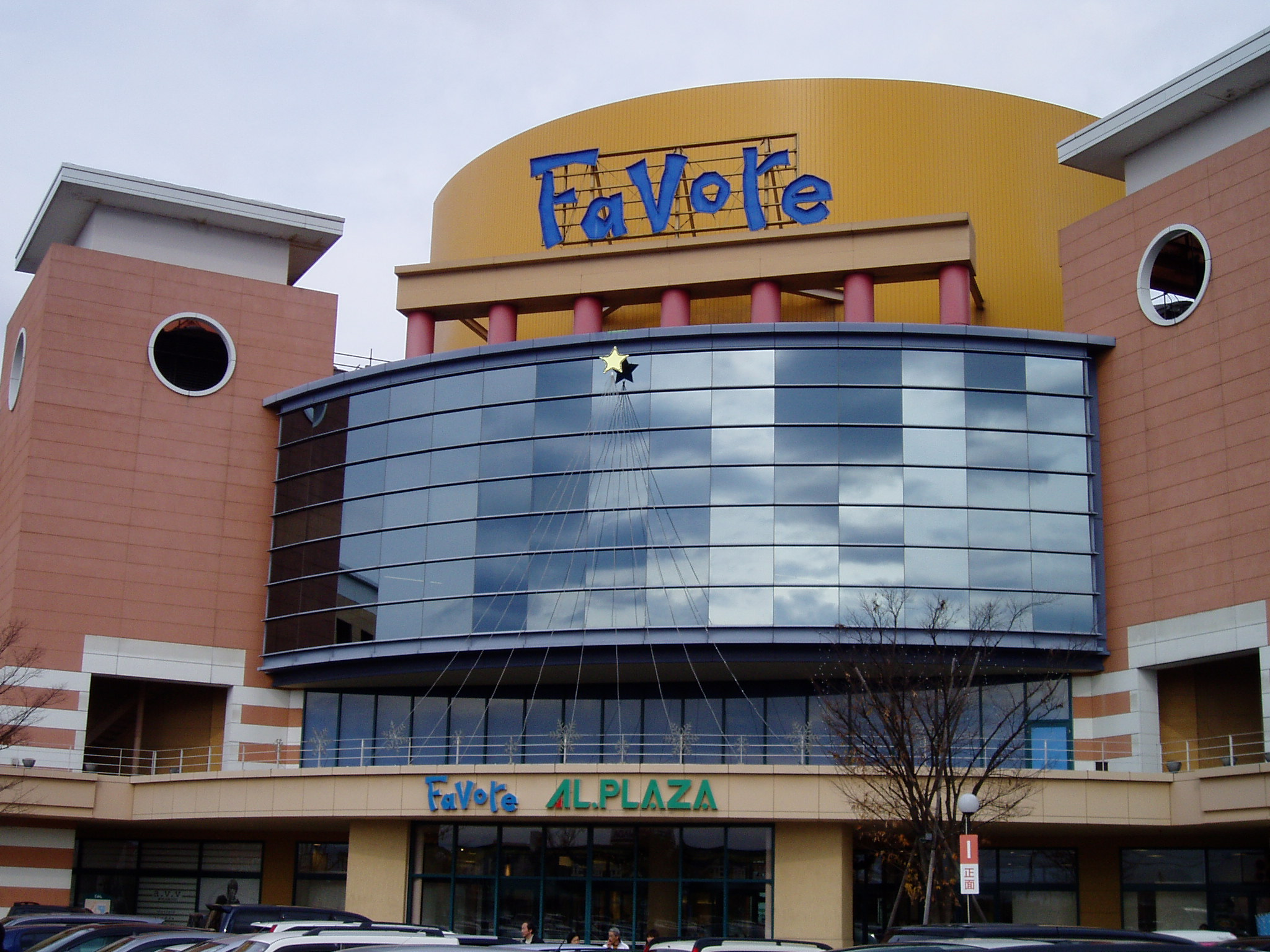 富山県最大級の商業施設「ファボーレ」